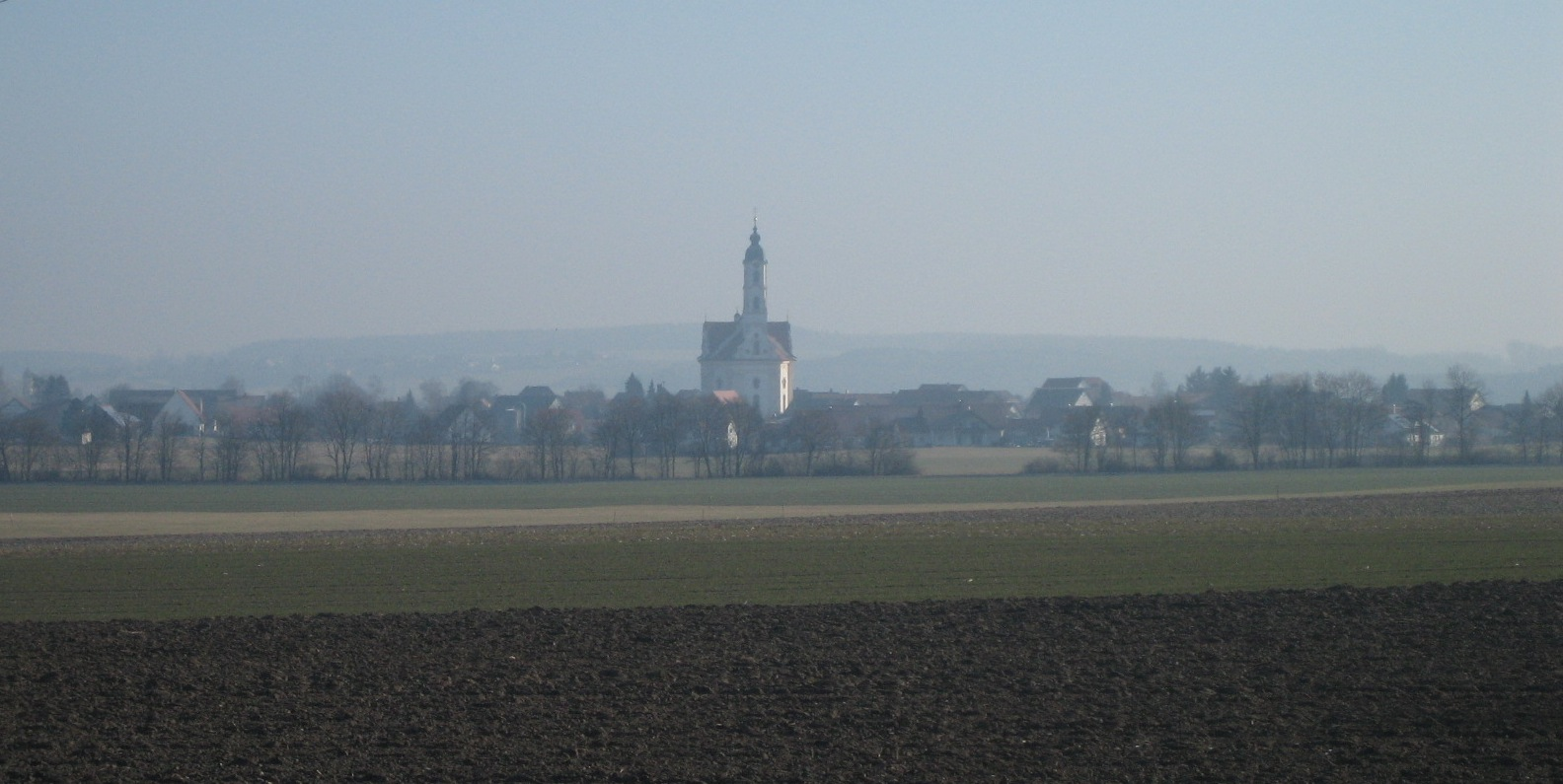 Wallfahrtskirche Steinhausen